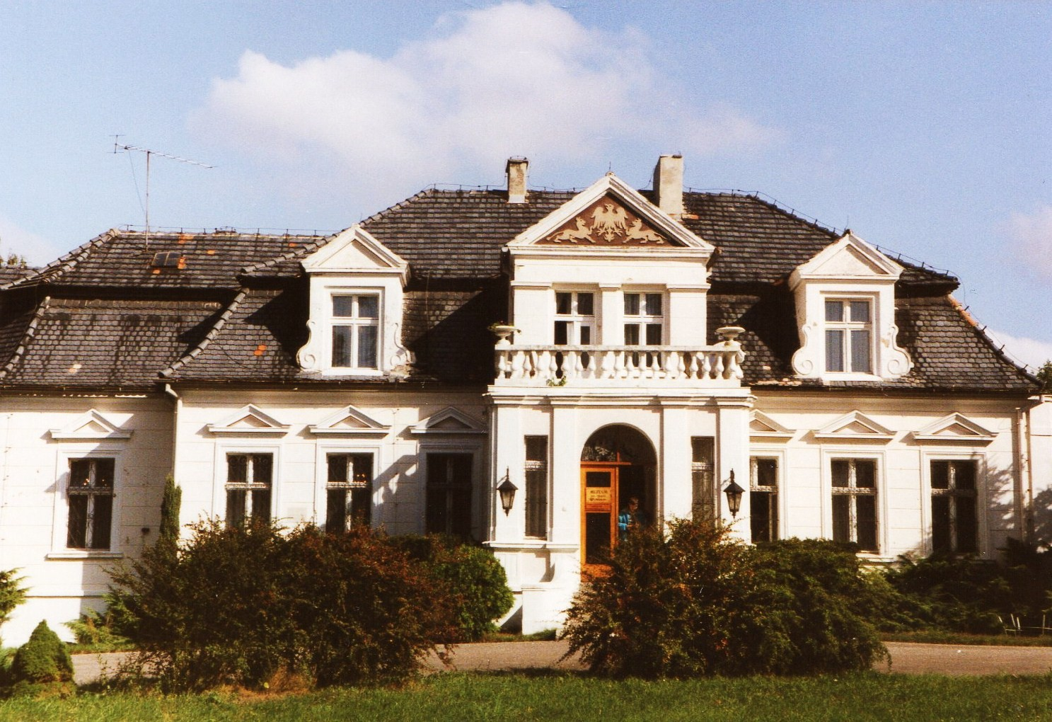 Dwór w Manieczkach. 1993r.